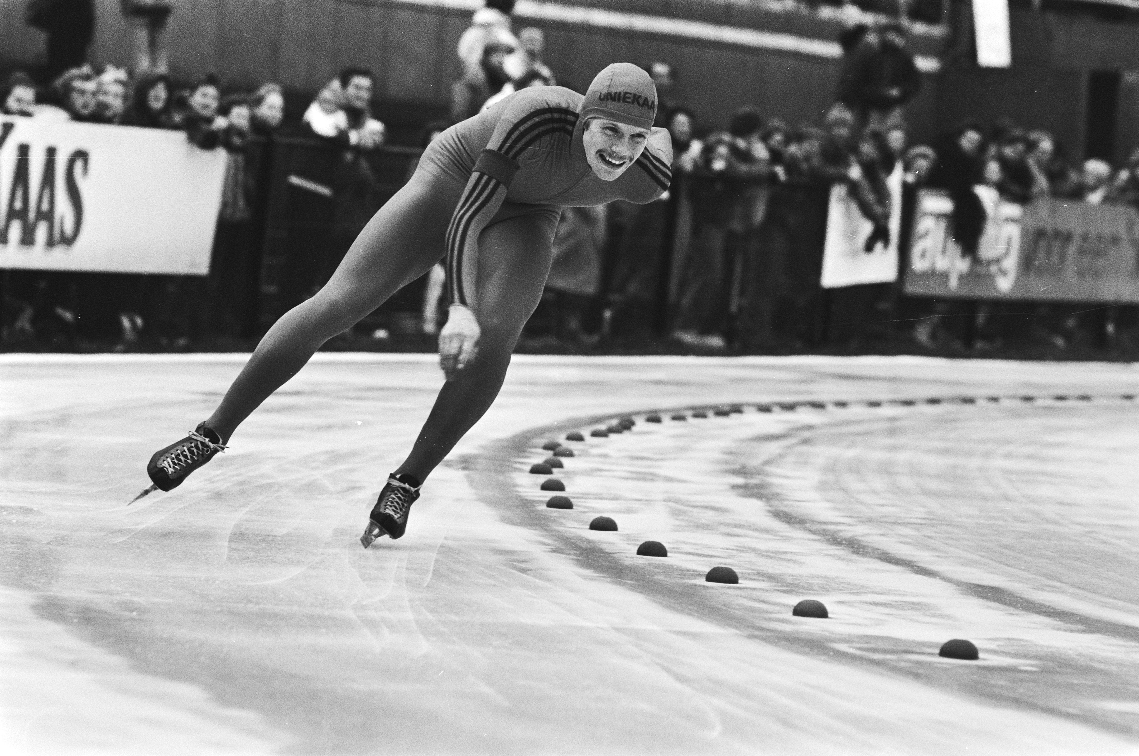 Collectie / Archief : Fotocollectie Anefo Reportage / Serie : Nederlandse kampioenschappen schaatsen allround mannen in Deventer Beschrijving : Harm van de Pal in actie op de 1500 meter Datum : 9 januari 1983 Locatie : Deventer, Overijssel Trefwoorden : schaatsen, schaatswedstrijden, sport Persoonsnaam : Harm van de Pal Fotograaf : Bogaerts, Rob / Anefo Auteursrechthebbende : Nationaal Archief Materiaalsoort : Negatief (zwart/wit) Nummer archiefinventaris : bekijk toegang 2.24.01.05 Bestanddeelnummer : 932-4571